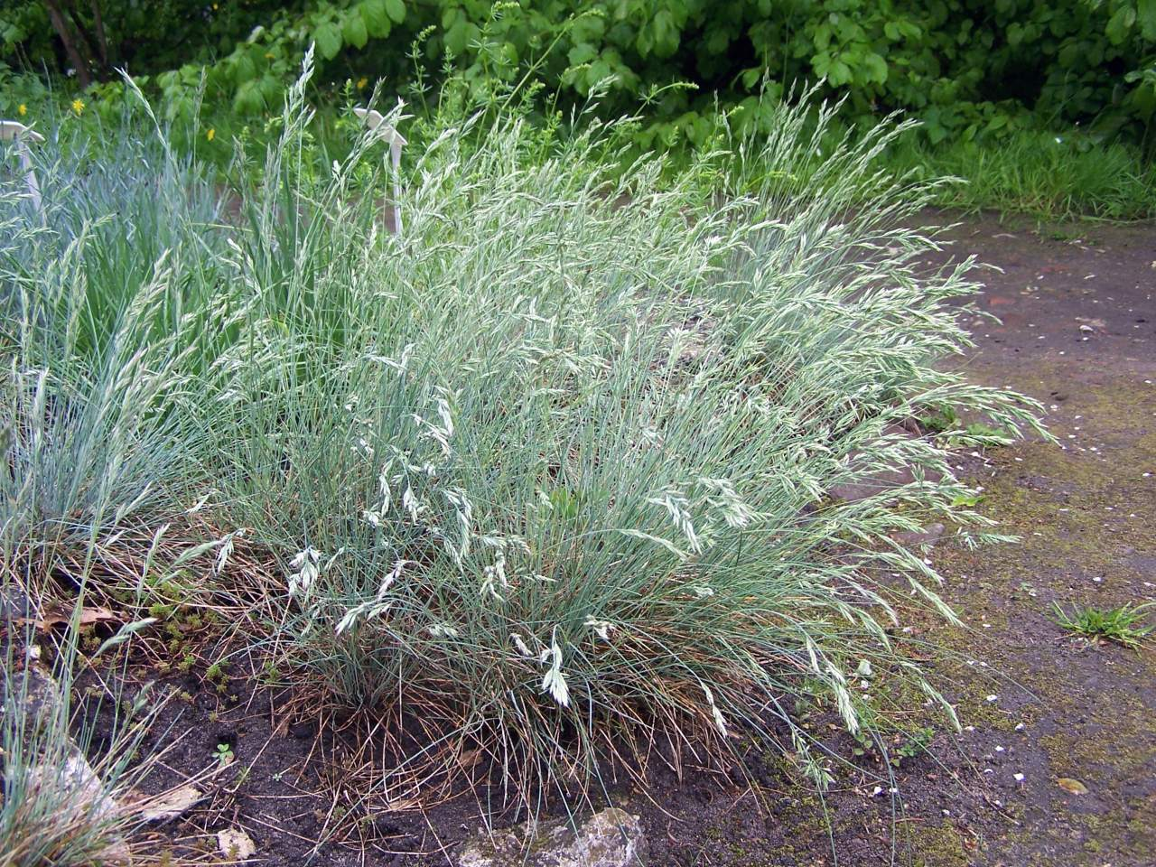 Festuca cinerea (pl. kostrzewa popielata, kostrzewa sina)